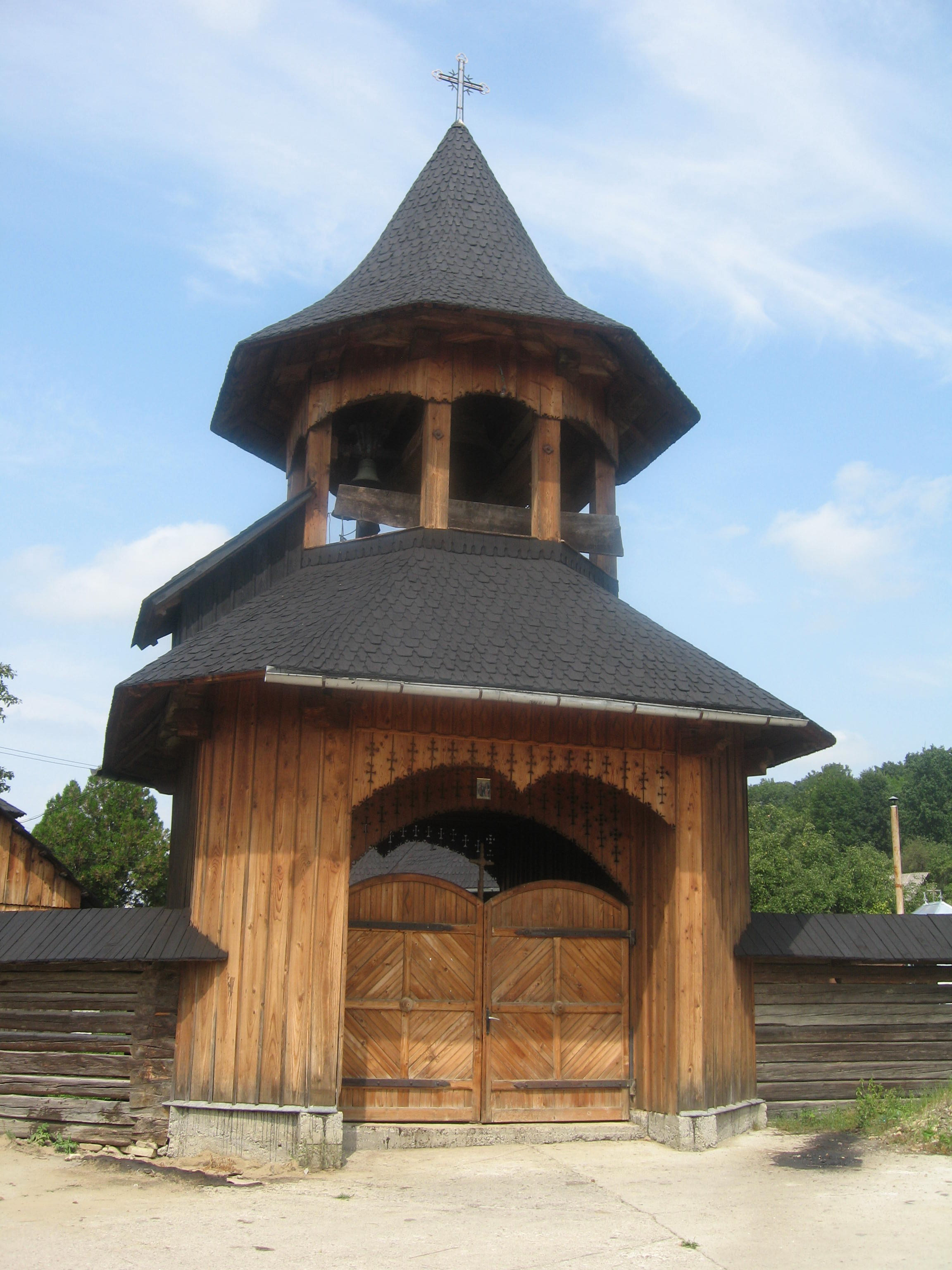 Biserica de lemn din Pârteştii de Sus, judeţul Suceava